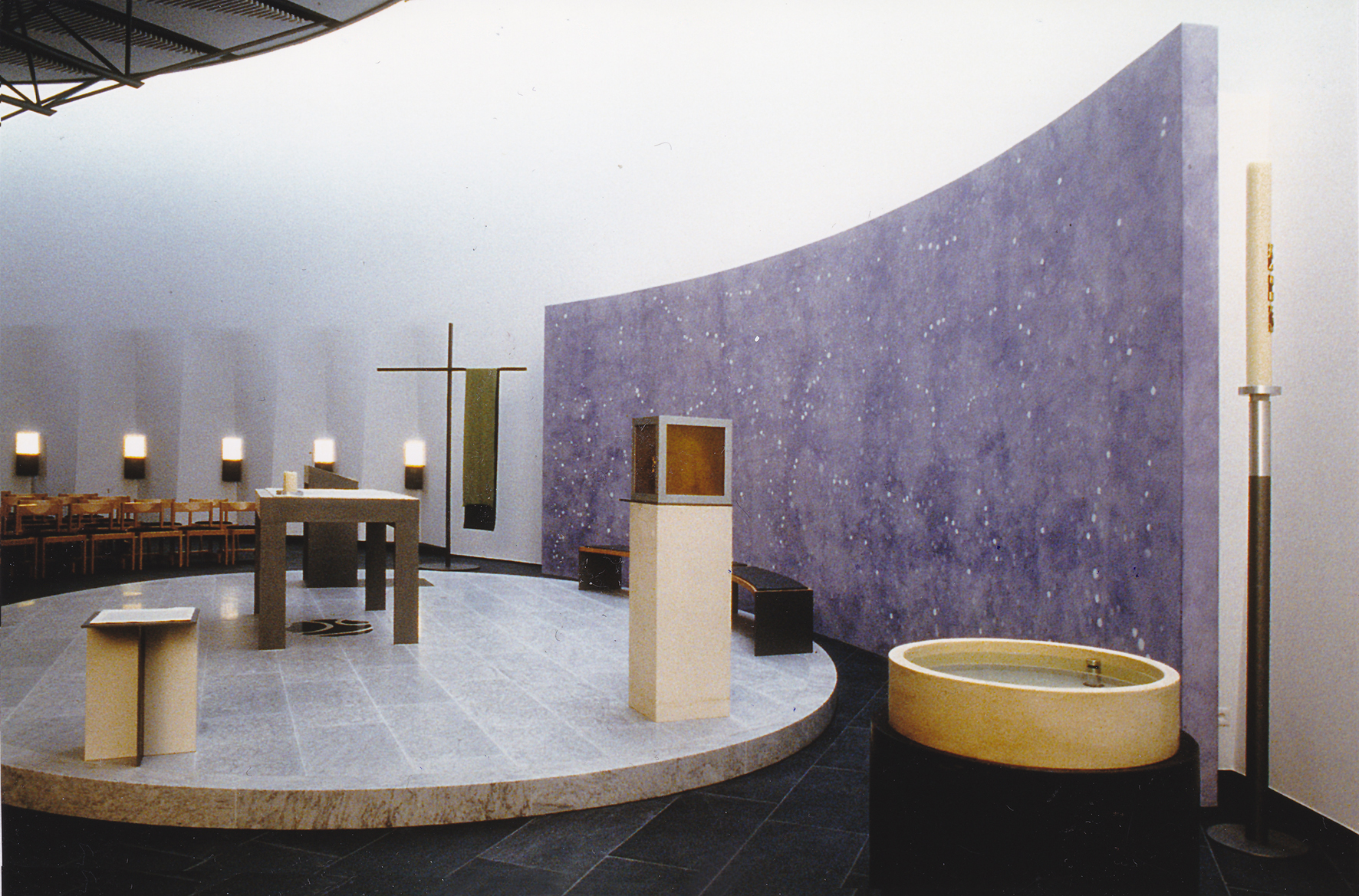 Römisch-katholische Pfarrkirche Hl. Dreifaltigkeit Zollikon, Taufstein Tabernakel